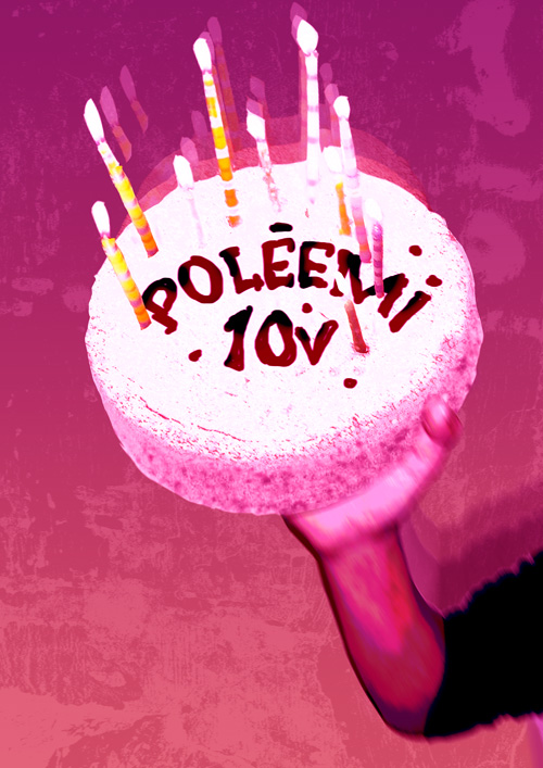 poleemi10vee